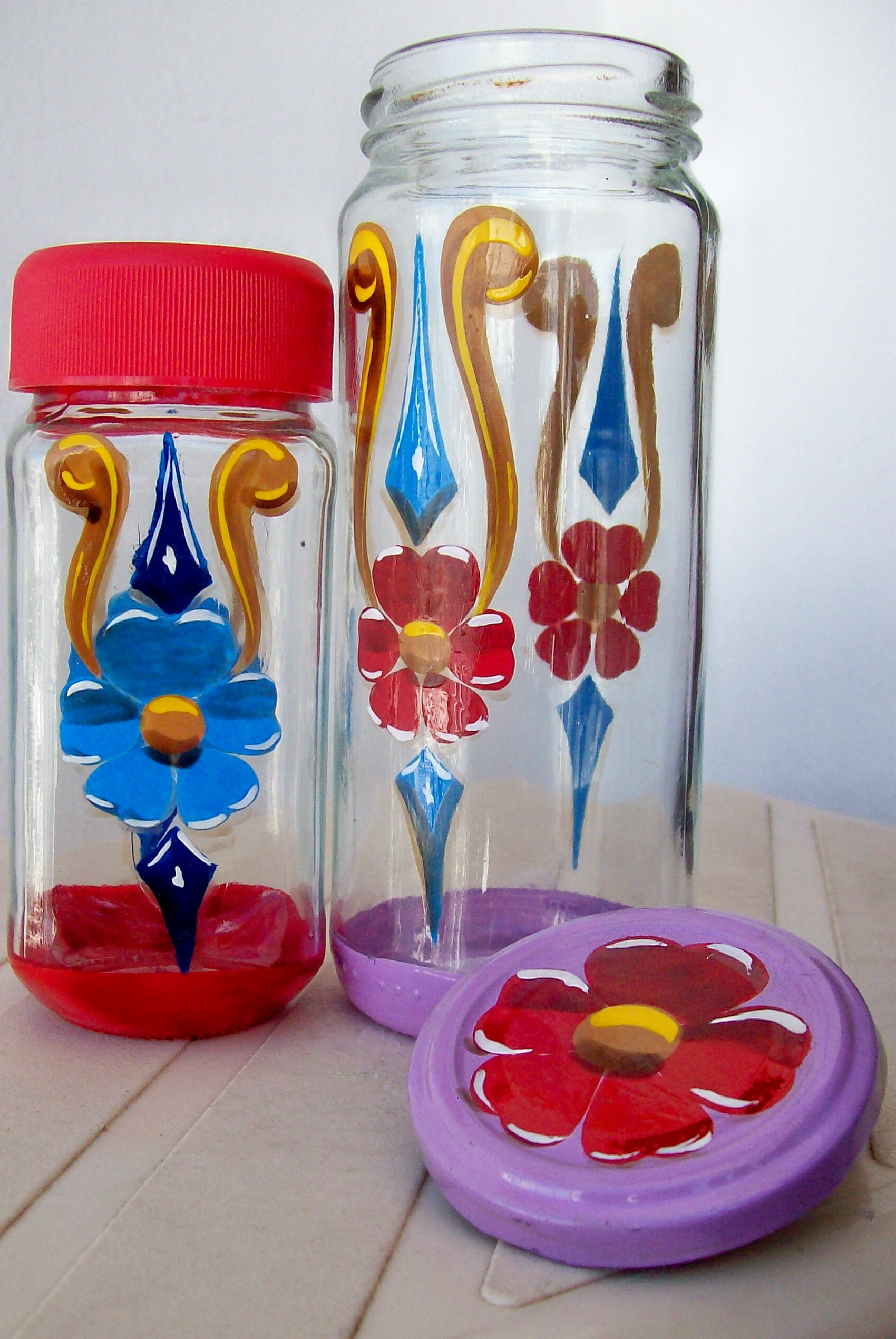 FILETEADO PORTEÑO: Frascos comprados en ferretería de Avenida Pueyrredón, Buenos Aires.